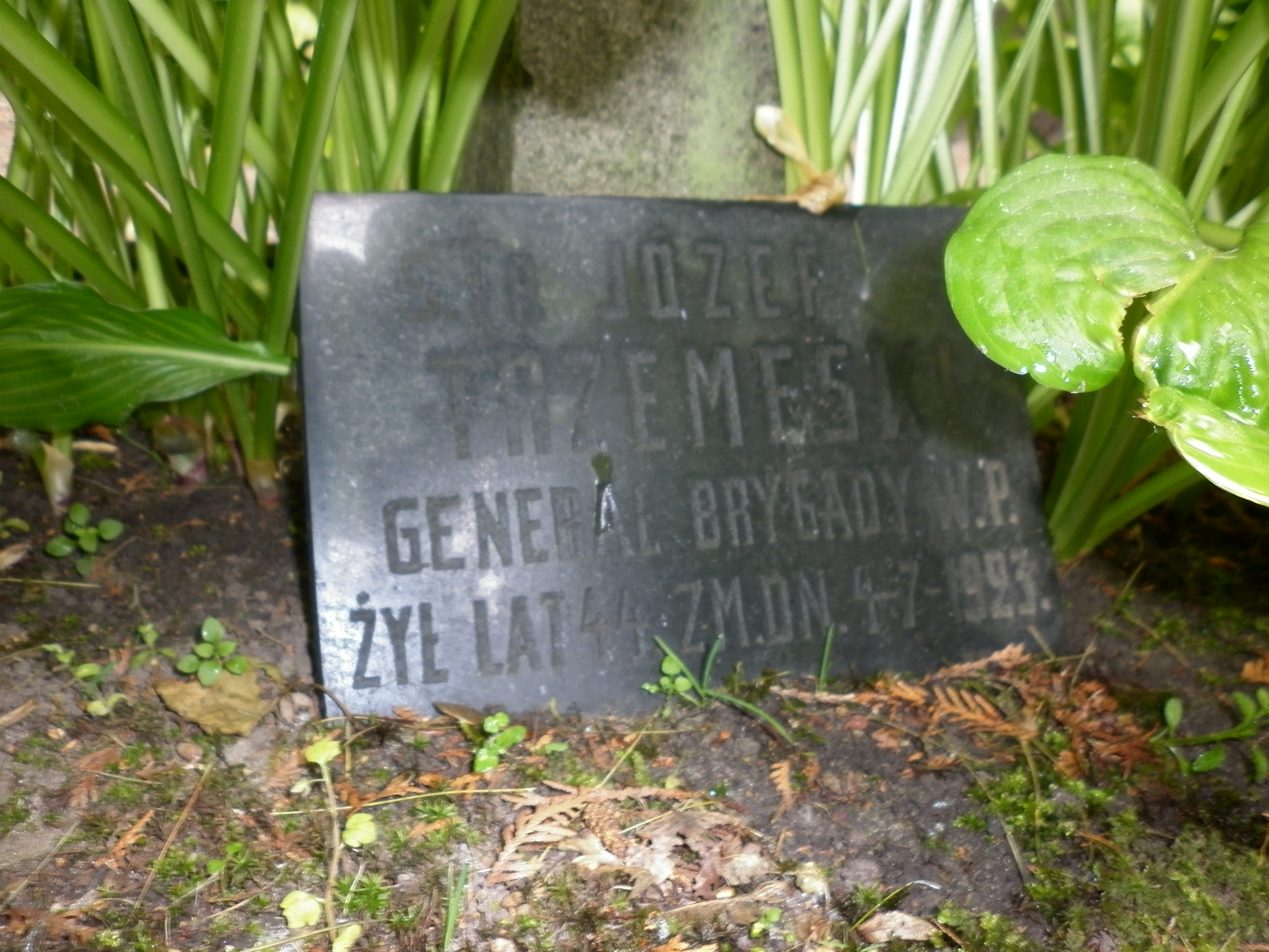 Tablica z grobu Józefa Trzemeskiego na Cmentarzu Wojskowym na Powązkach